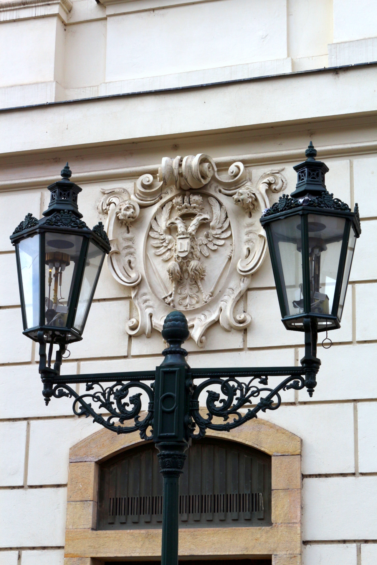 Staroměstský karmelitánský klášter u sv. Havla